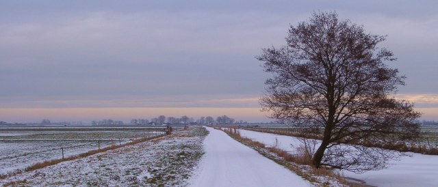 Winterlandschap